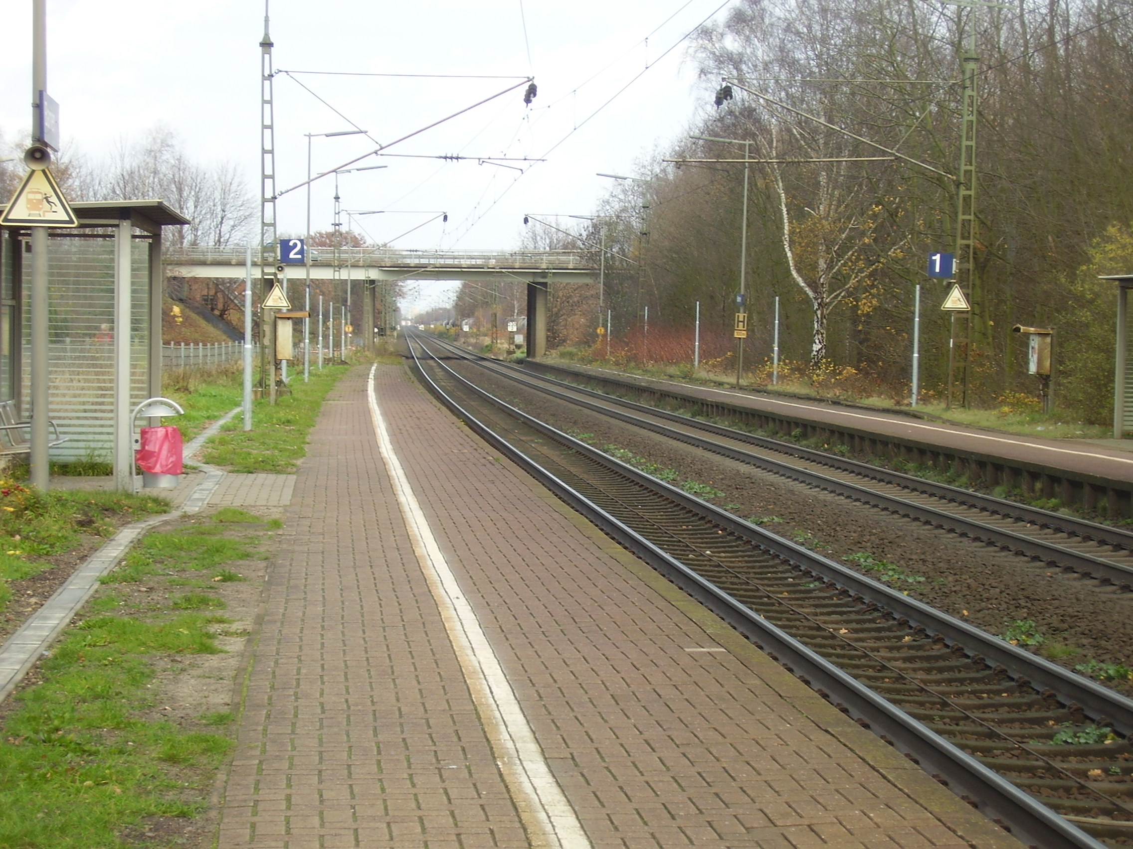 Syke; ortsteil Barrien, Niedersachsen; fotografiert: November 2008